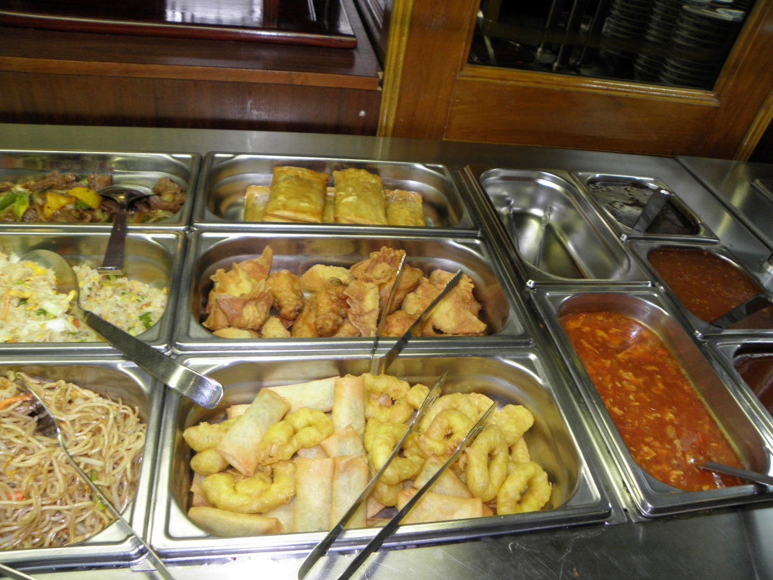 Bilder vom Stammtisch Remstal im China-Restaurant Mandarin Garden, Bahnhofstraße 31, Remshalden